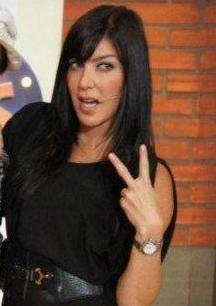 En esta fotografia, Suso el paspi e isabella santodomingo como invitada en el programa de televisión. (The Suso's Show)